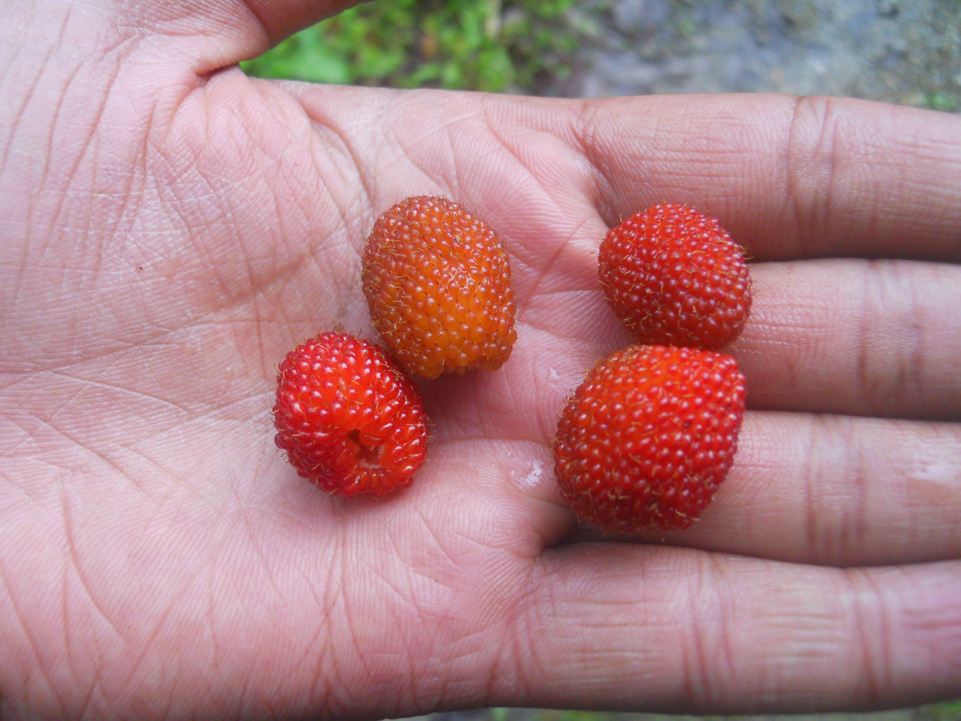 भारतातील अरुणाचल प्रदेशातील ईगलनेस्ट अभयारण्यातील जंगली रास्पबेरी फळे. Wild raspberries found in the Eaglenest Wildlife Sanctuary, Arunachal Pradesh, India.